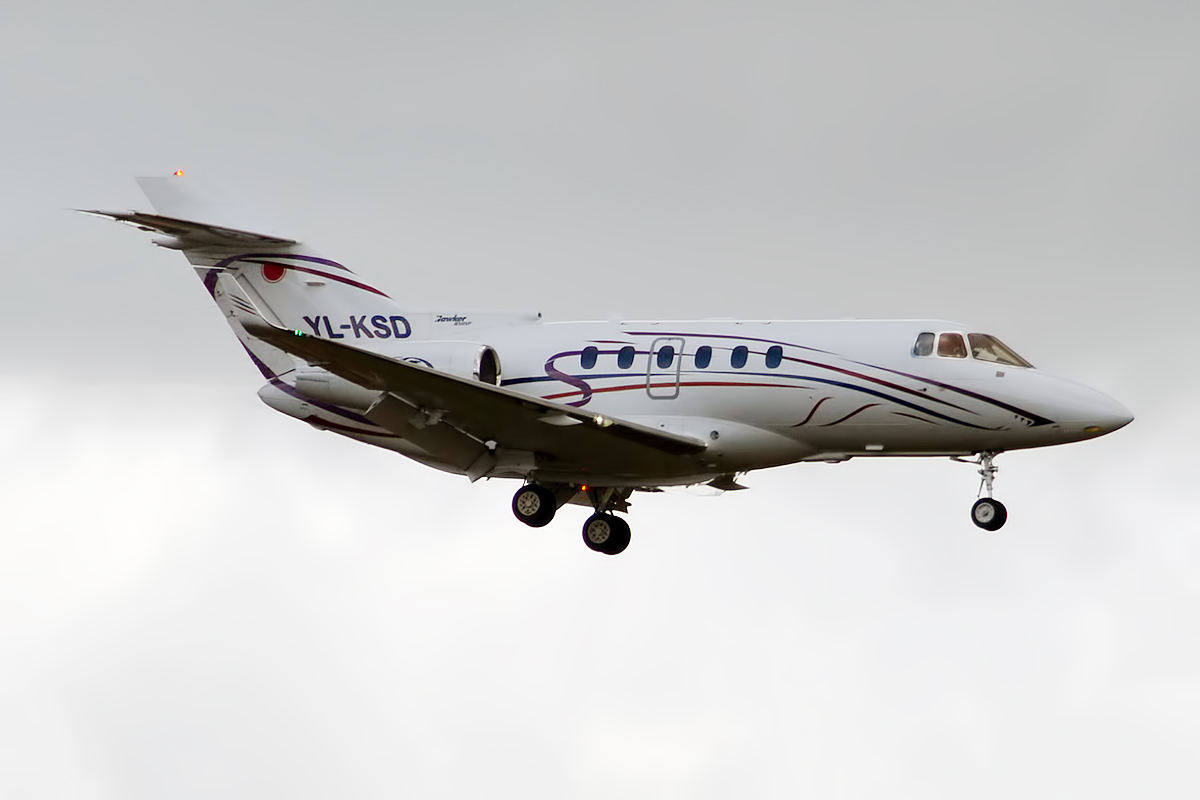 KS Avia, YL-KSD, Beechcraft Hawker 850XP